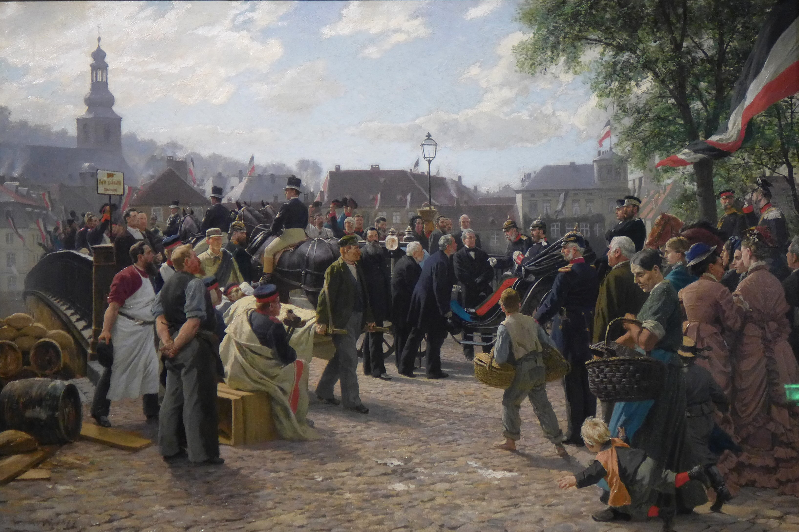 Anton von Werner, Farbskizze zum Saarbrücker Rathauszyklus „Ankunft König Wilhelms I. in Saarbrücken am 9. August 1870“, Saarbrücken war zu Anfang des Deutsch-Französischen Krieges von den Franzosen besetzt worden. Drei Tage nach der Erstürmung der Spicherer Höhen zog der preußische König siegreich in Saarbrücken ein. (Deutsches Historisches Museum, Zeughaus, Berlin)